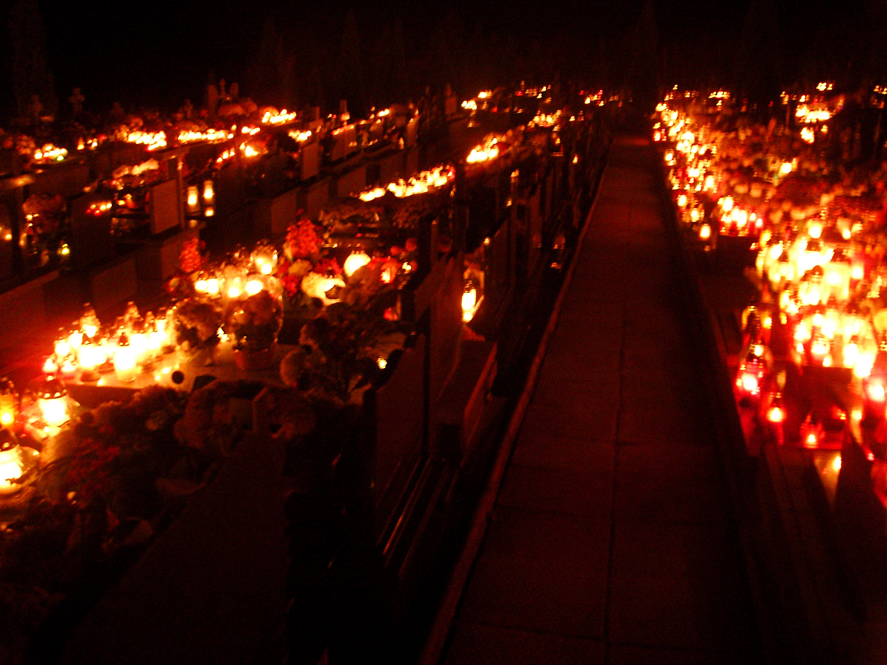 Cmentarz parafialny w Bączalu Dolnym, Polska (powiat jasielski) w dzień Wszystkich Świętych